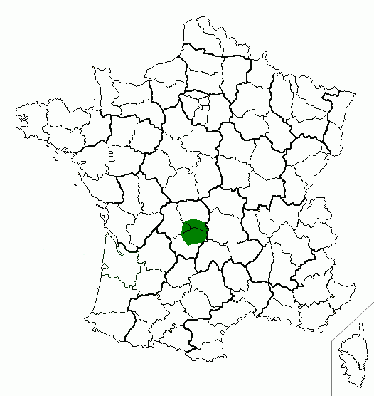 Situation du Plateau de Millevaches